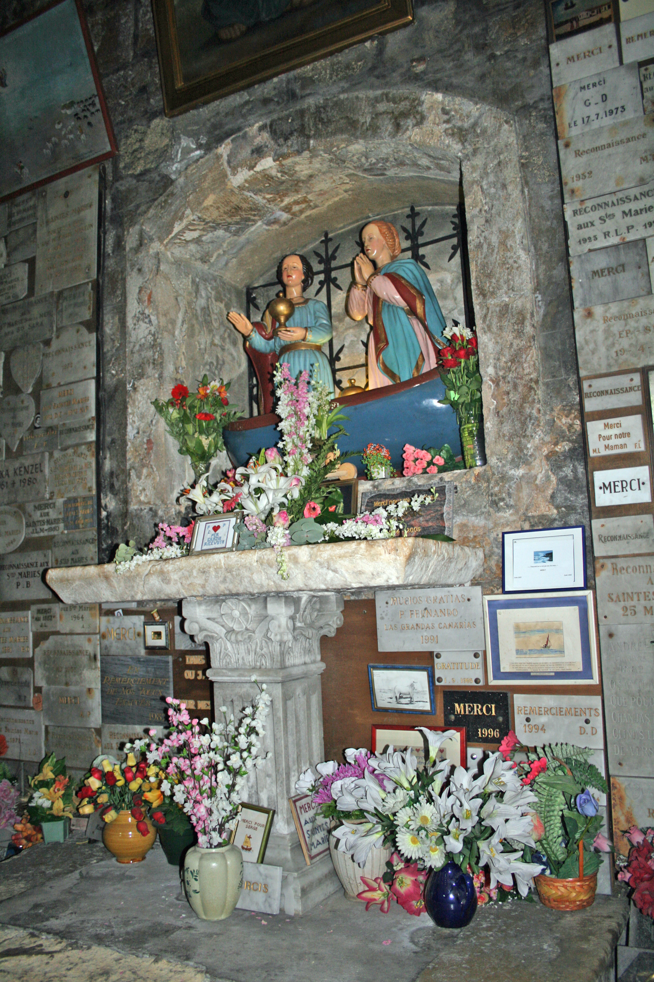 Marie Salomé et Marie Jacobé